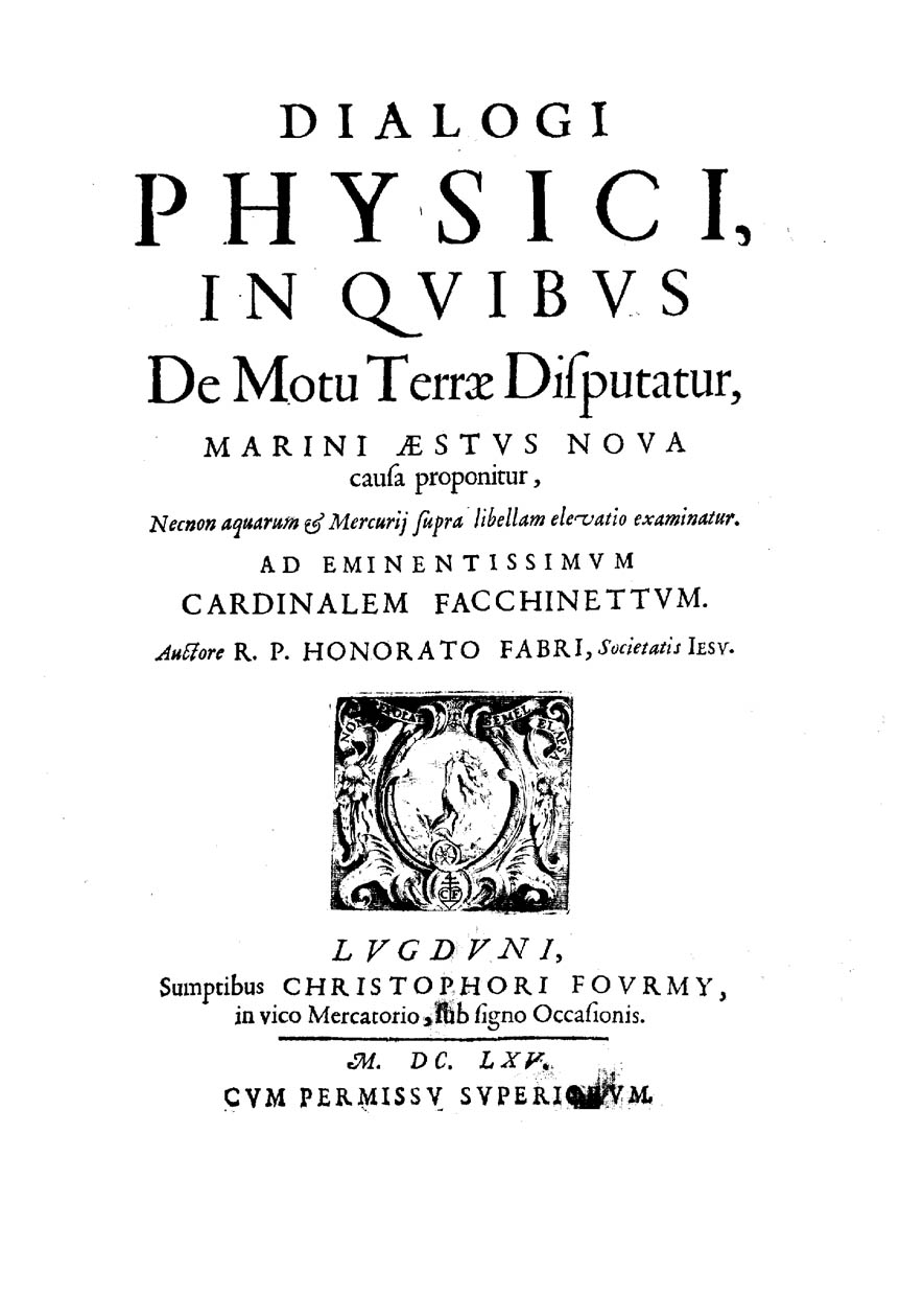 Frontespizio